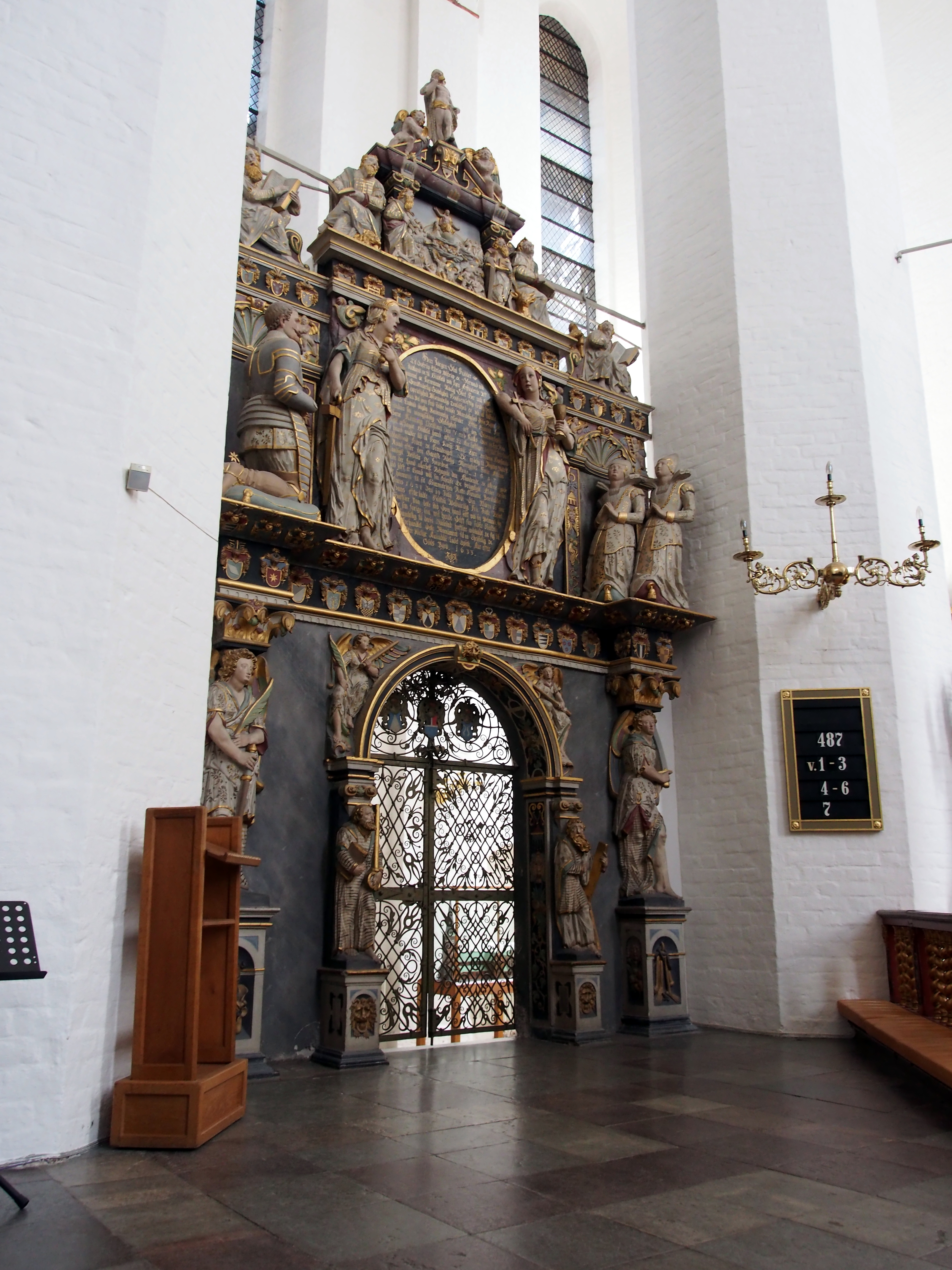 Photographed at Århus Domkirke, Denmark.